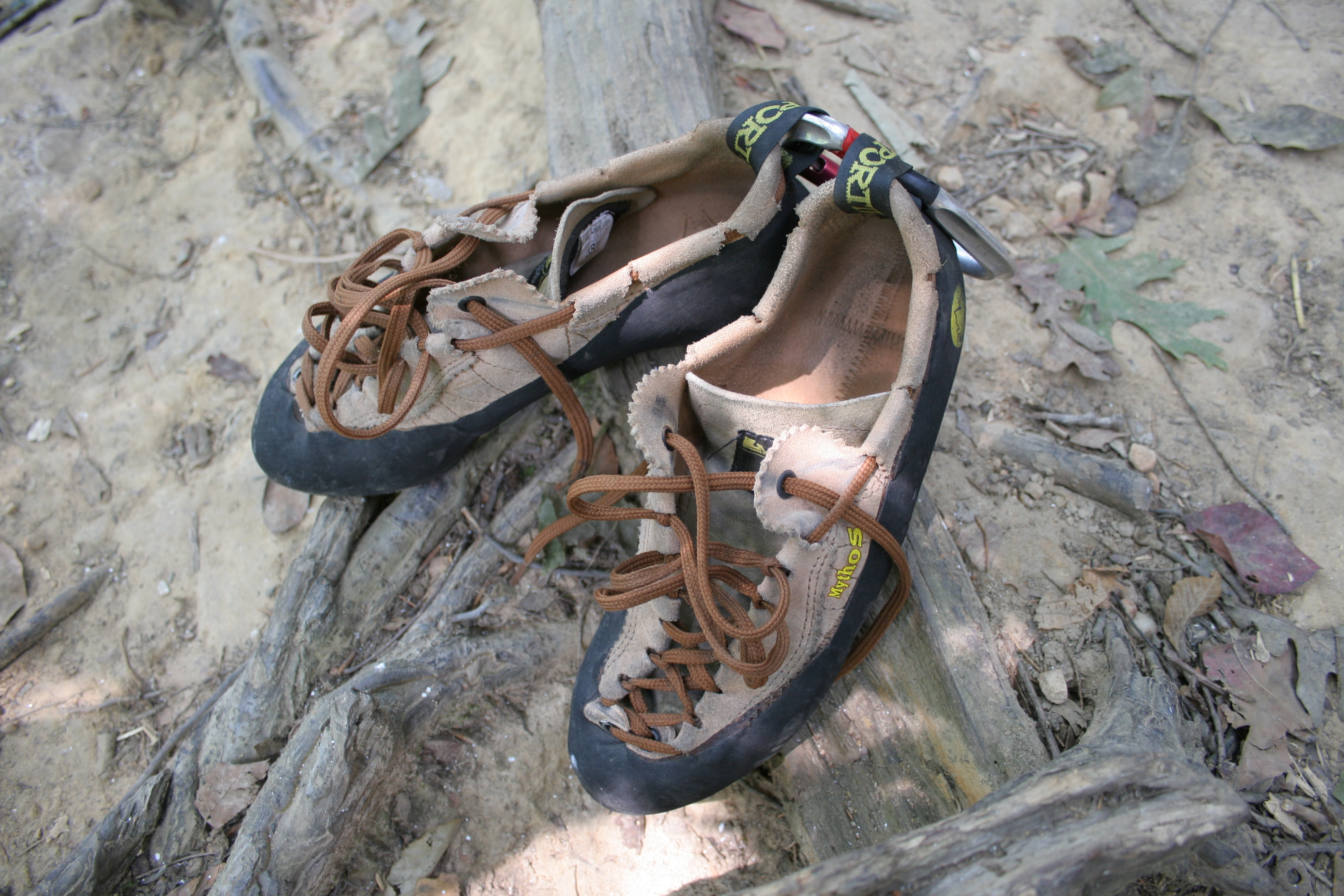 Chaussons d'escalade de la marque La Sportiva et du modèle "Mythos". Photo prise à l'extérieur.